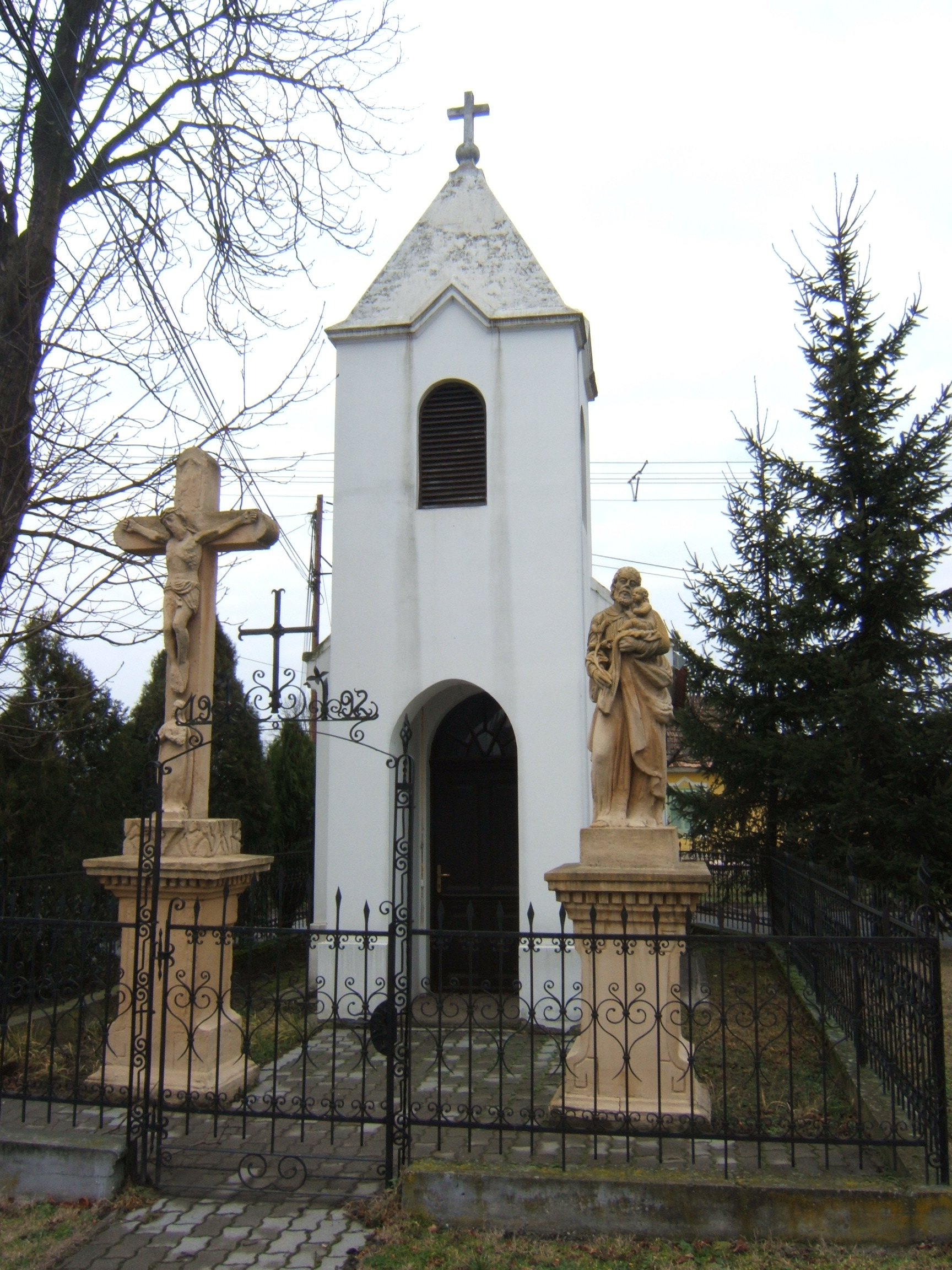 Henészi kápolna, Nagyatád